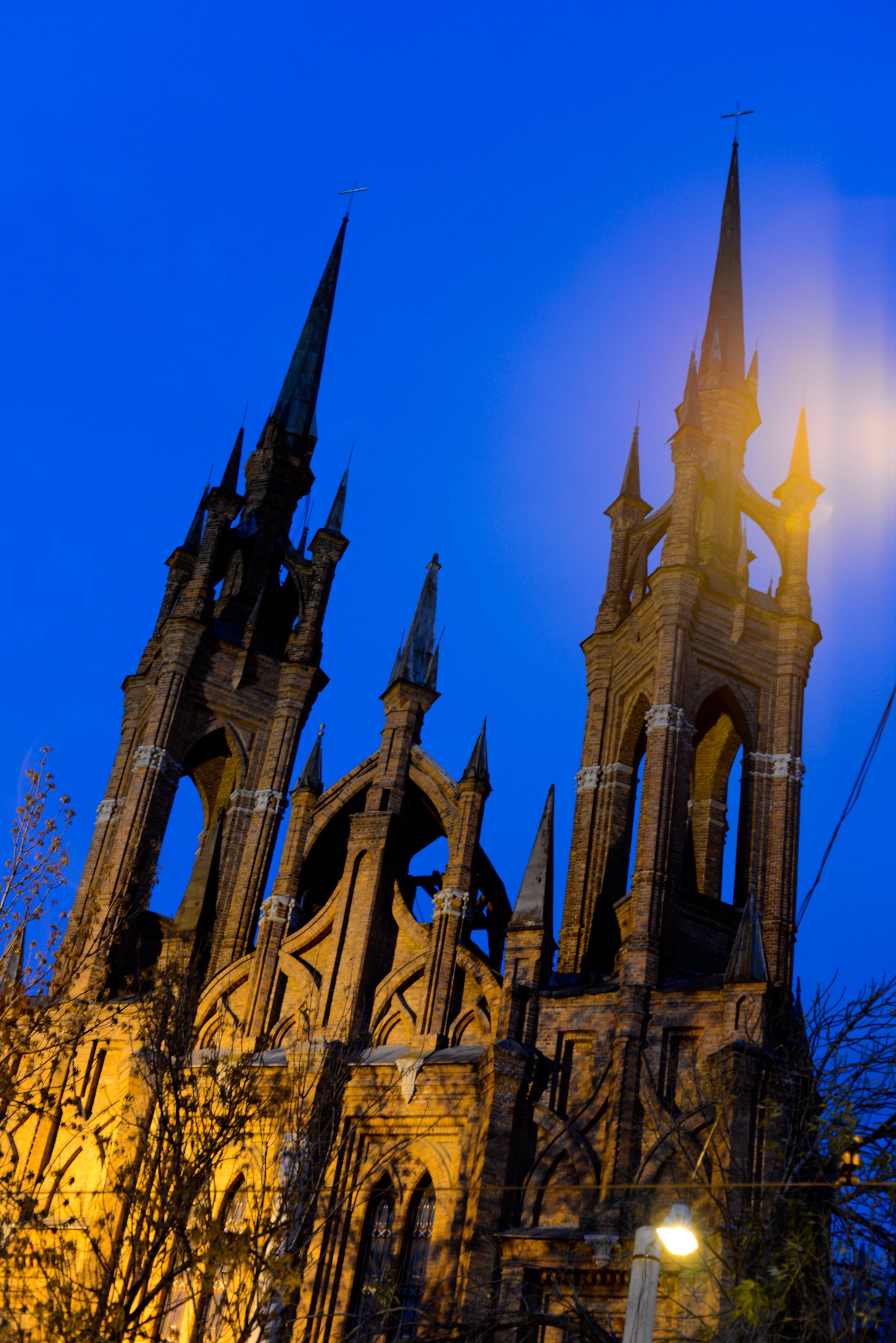 Костел Польский (Самарская область, Самара, Фрунзе улица, 157, лит. 1, 2, 3)